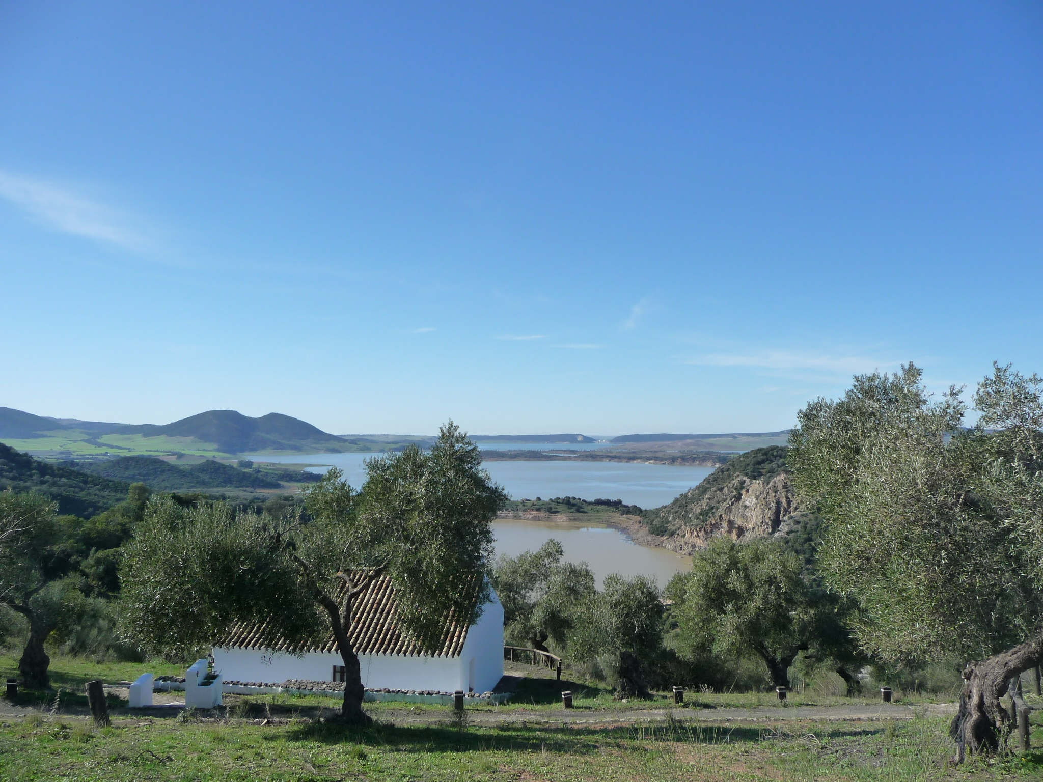 TajoDelAguila-P1060315.JPG